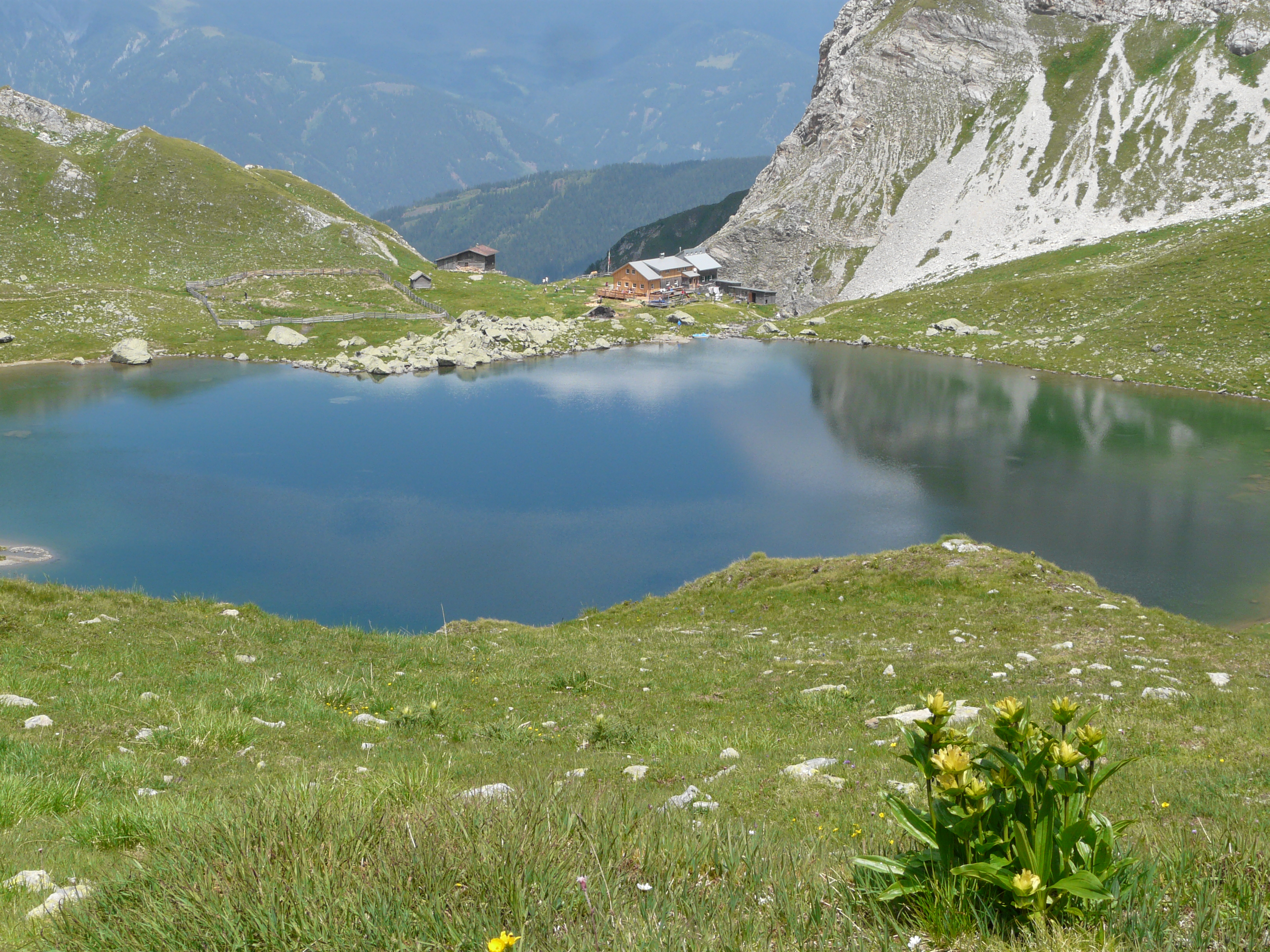 Obstansersee mit Obstansersee-Hütte, gelber Enzian